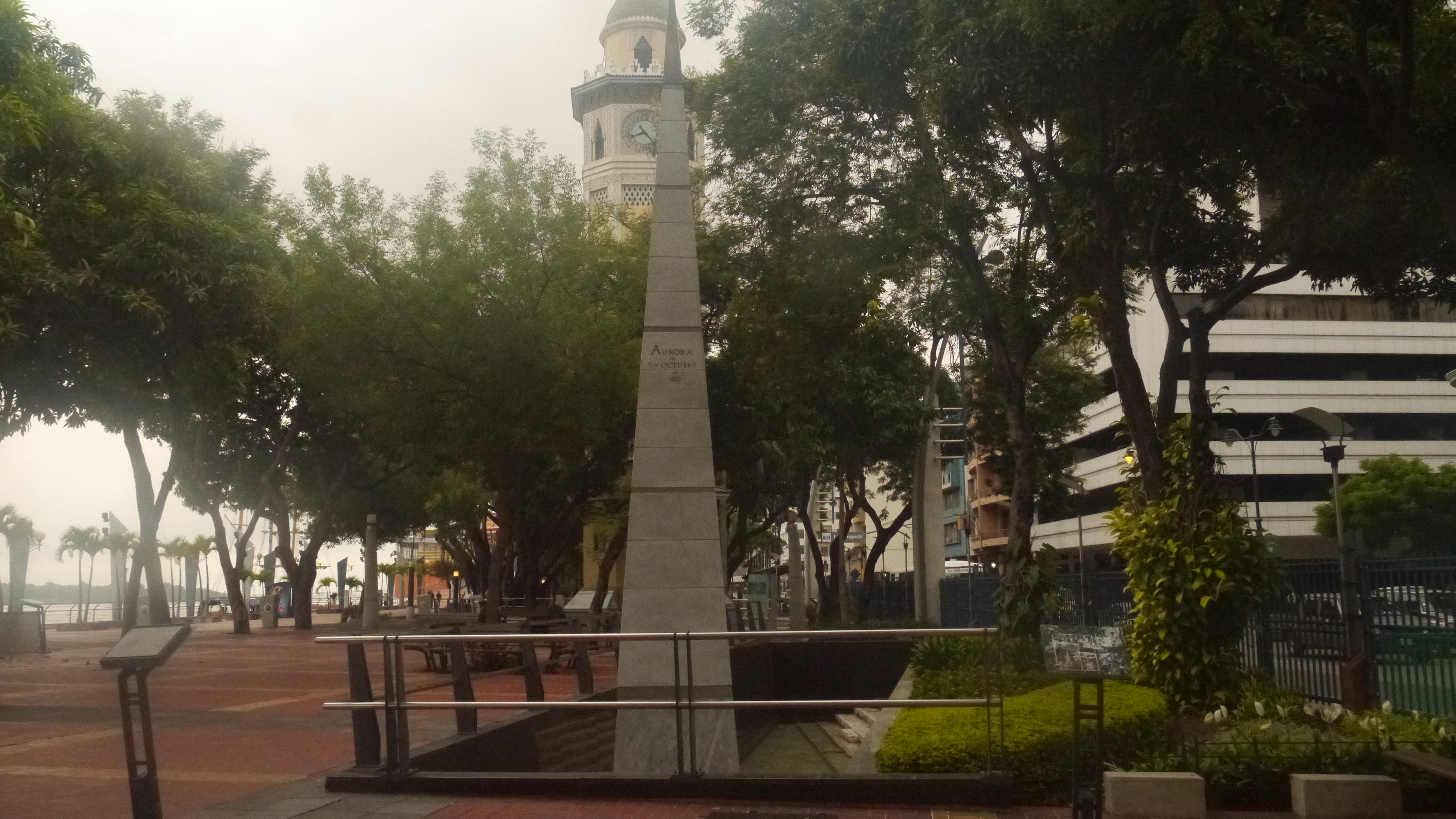 Vista frontal del Obelisco a la Aurora Gloriosa de 1820 en el Malecón 2000